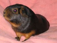 MS Glatthaar in Black and Tan